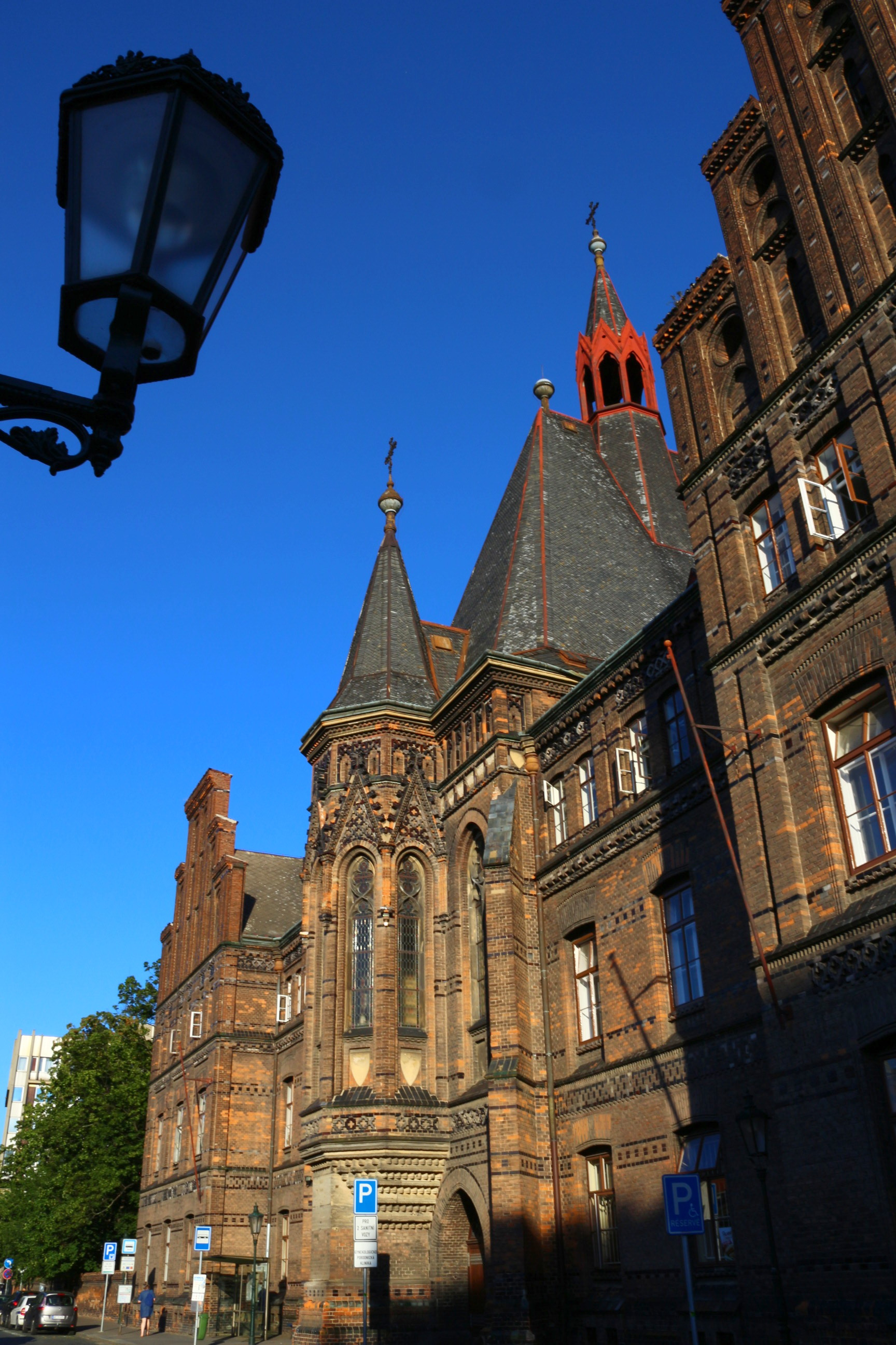 Praha, porodnice u Apolináře